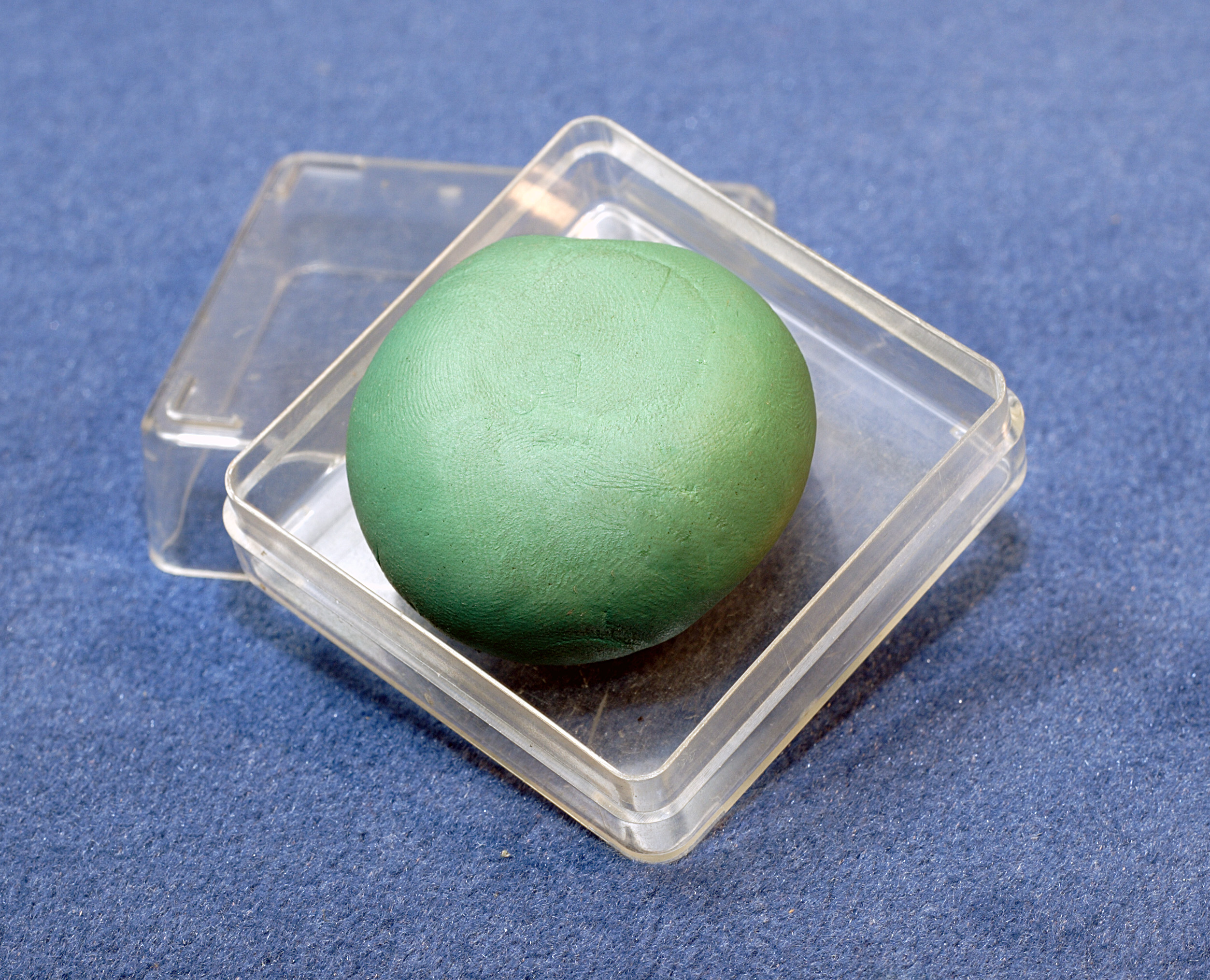 Typengummi